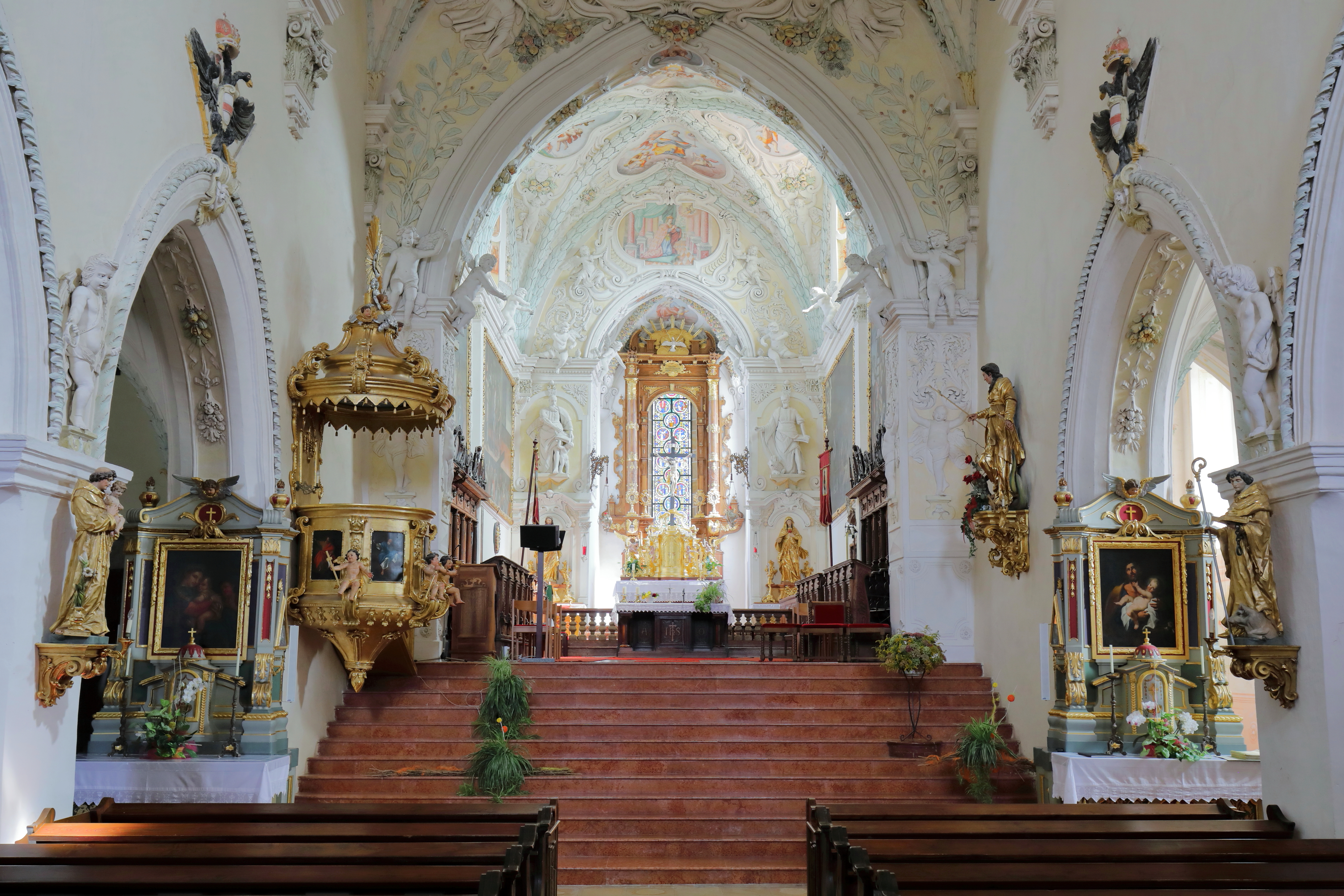 Innenansicht der röm.-kath. Pfarrkirche hl. Margareta und ehemaligen Kollegiatstiftskirche in der niederösterreichischen Marktgemeinde Ardagger mit Blickrichtung erhöhtem Chor. Die gotische Kirche wurde in 2 Phasen barockisiert (1620/27 und 1678). Das Margaretenfenster hinter dem Hochaltar ist die älteste figürliche Glasmalerei Österreichs (1230-1240).